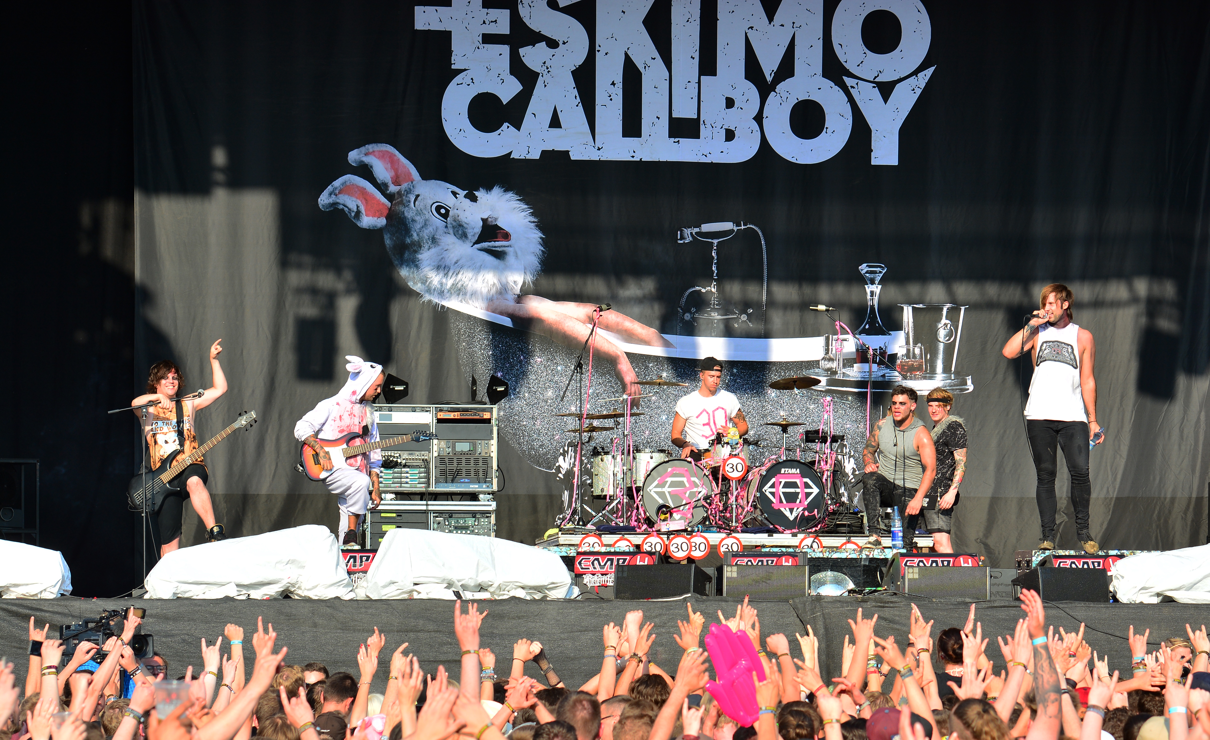 Eskimo Callboy beim Reload Festival 2015